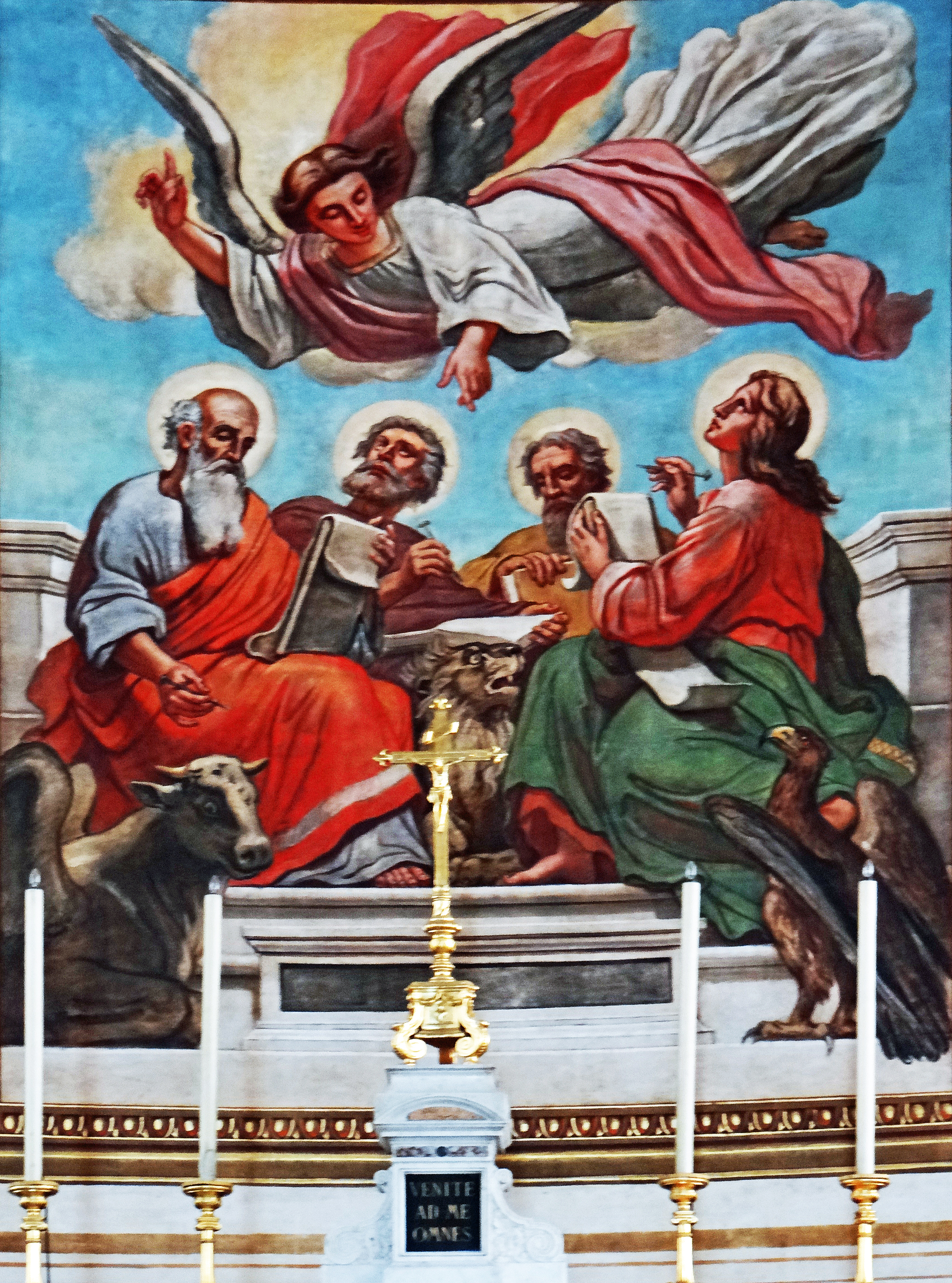 Nérac - Église Saint-Nicolas - Peinture du chœur : les Évangélistes